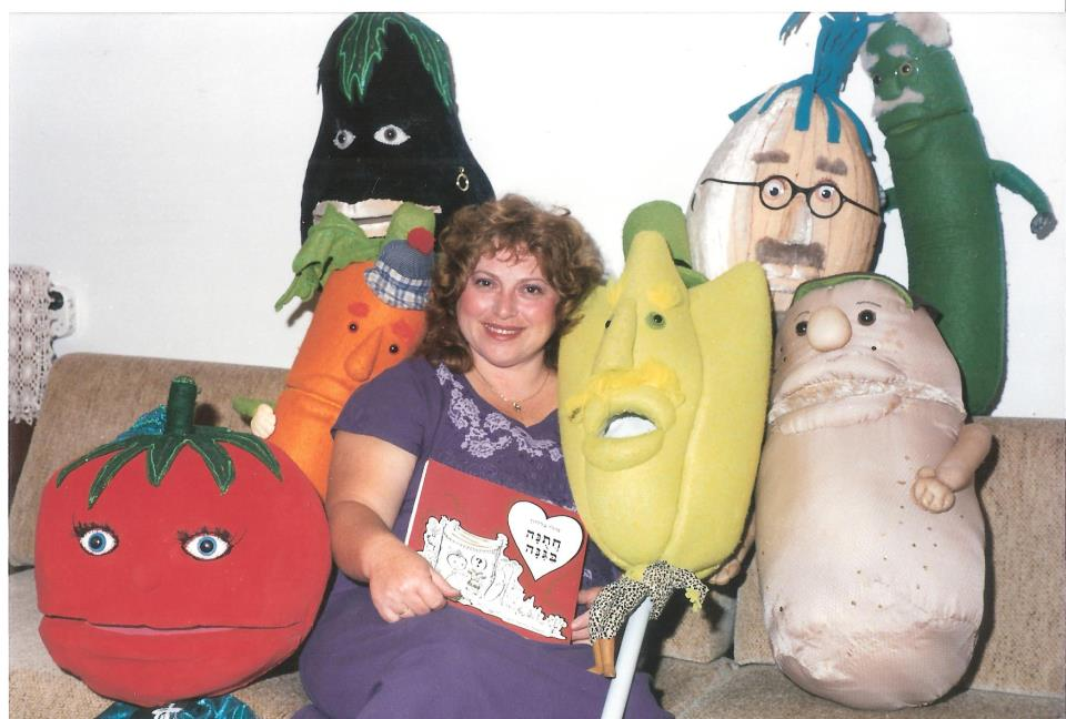 מירי צללזון עם דמויות "חתונה בגינה"